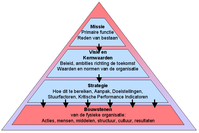 Een Bedrijfsplan beschrijft missie, visie, strategie en daaruitvolgend de acties / fysieke organisatie / inrichting